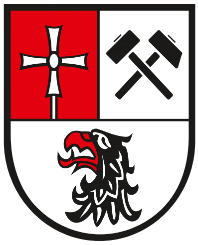 Wappen Pluwig